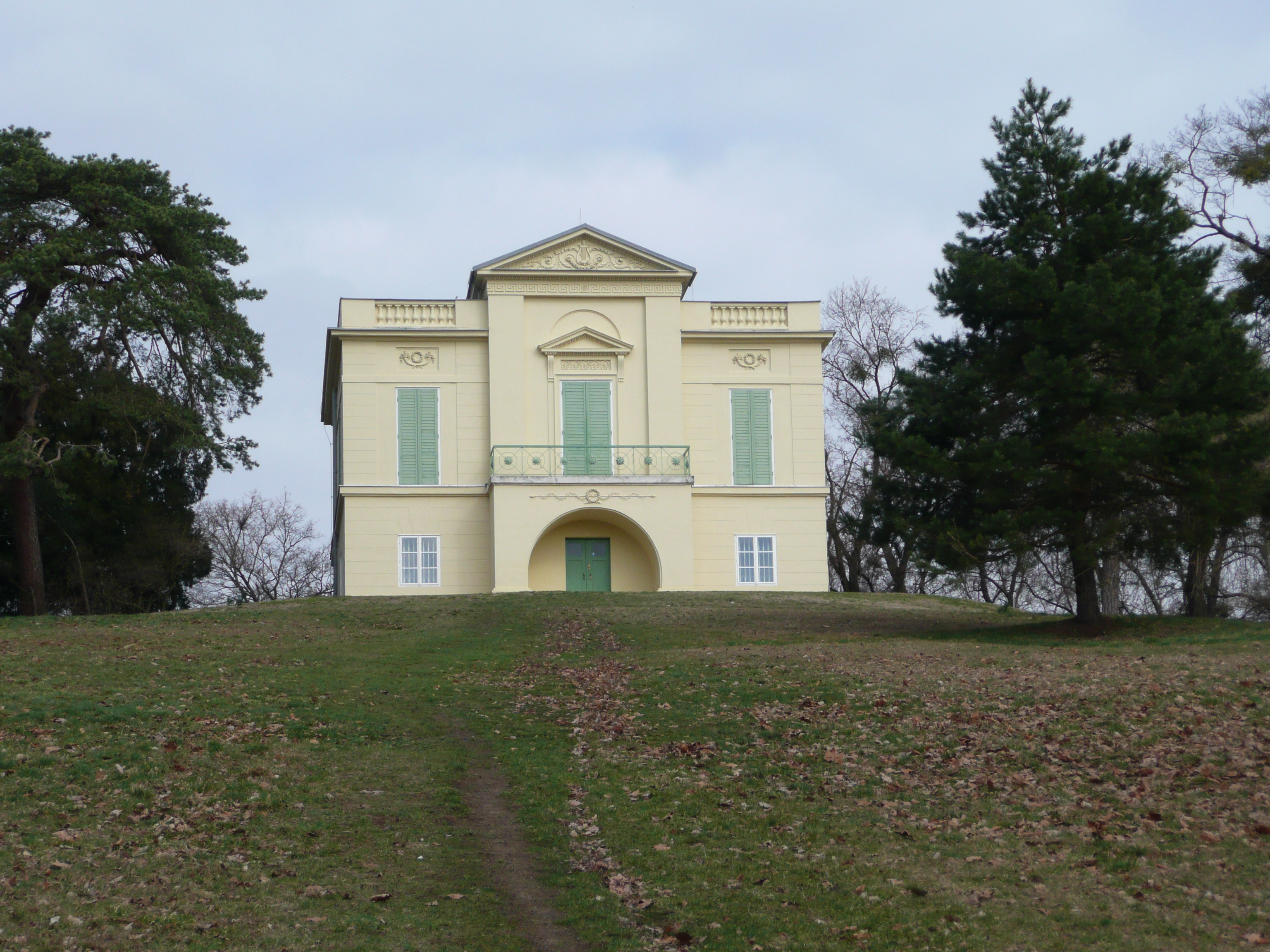 Zámek - Rybniční zámeček Lednice, Lednice 437